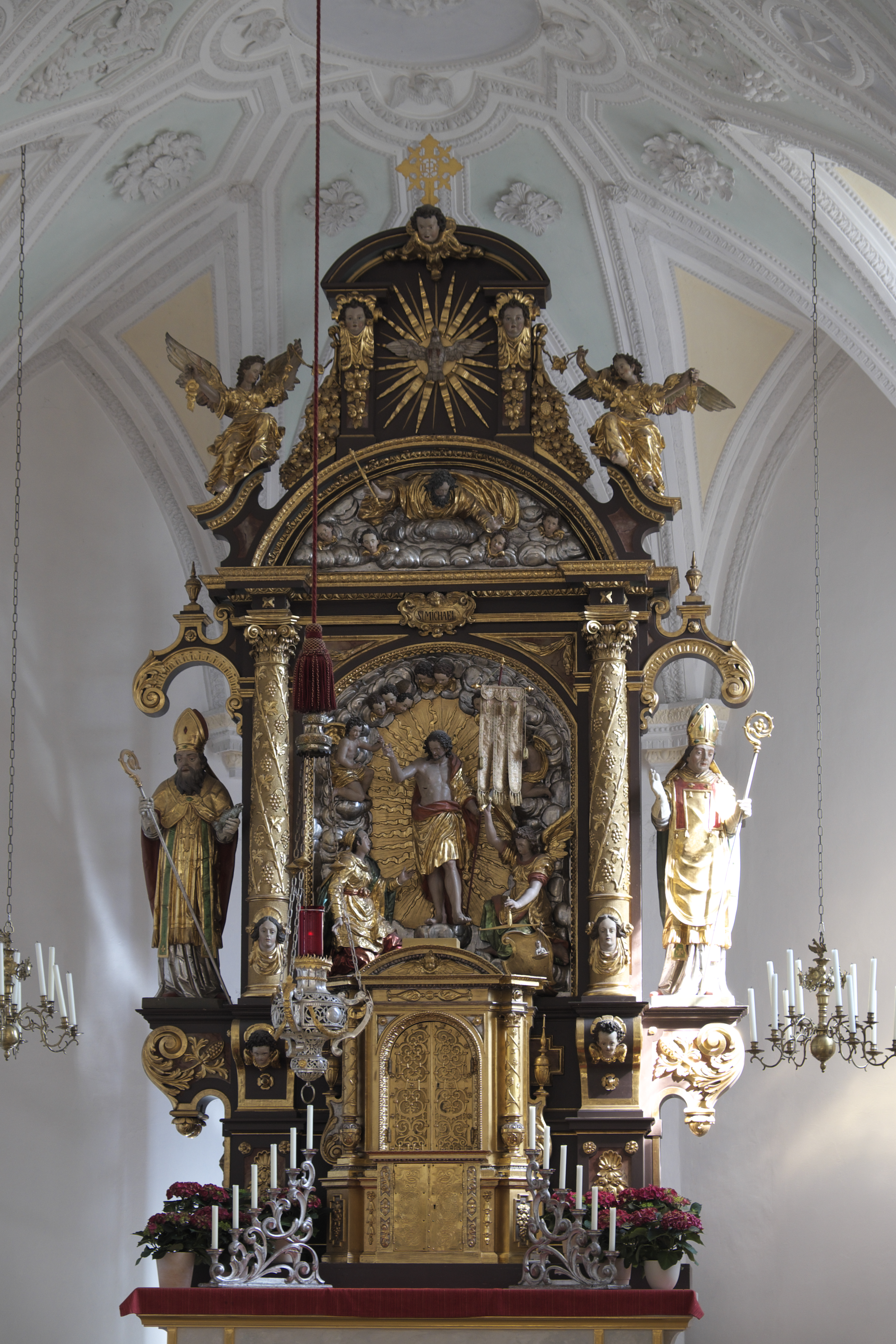 Katholische Pfarrkirche St. Michael in Seeshaupt im Landkreis Weilheim-Schongau (Bayern/Deutschland), Hochaltar von 1910